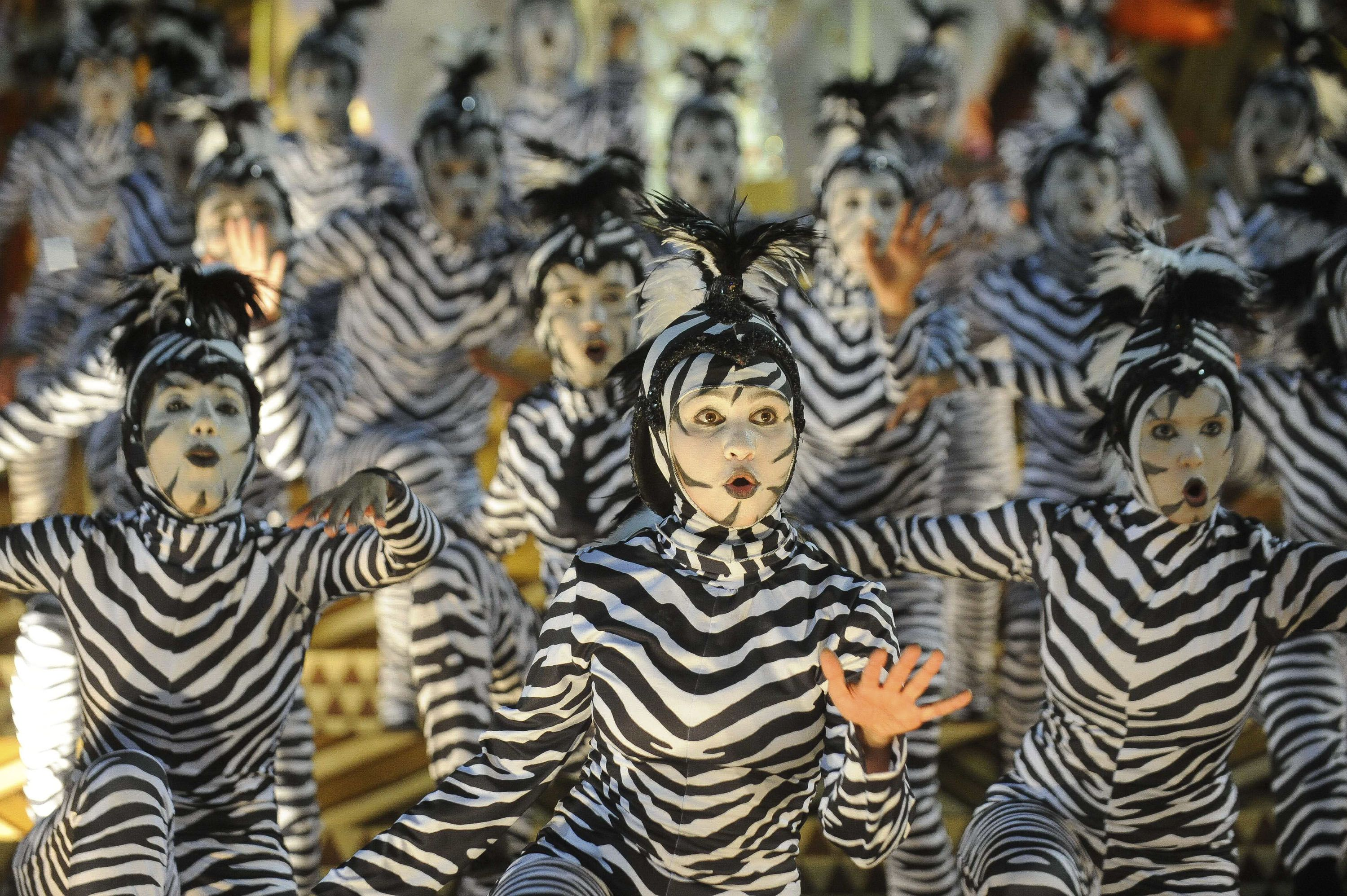 Rio de Janeiro - Escolas de samba do Grupo Especial se apresentam no Sambódromo da Marquês de Sapucaí, no primeiro dia de desfiles (Fernando Frazão/Agência Brasil)